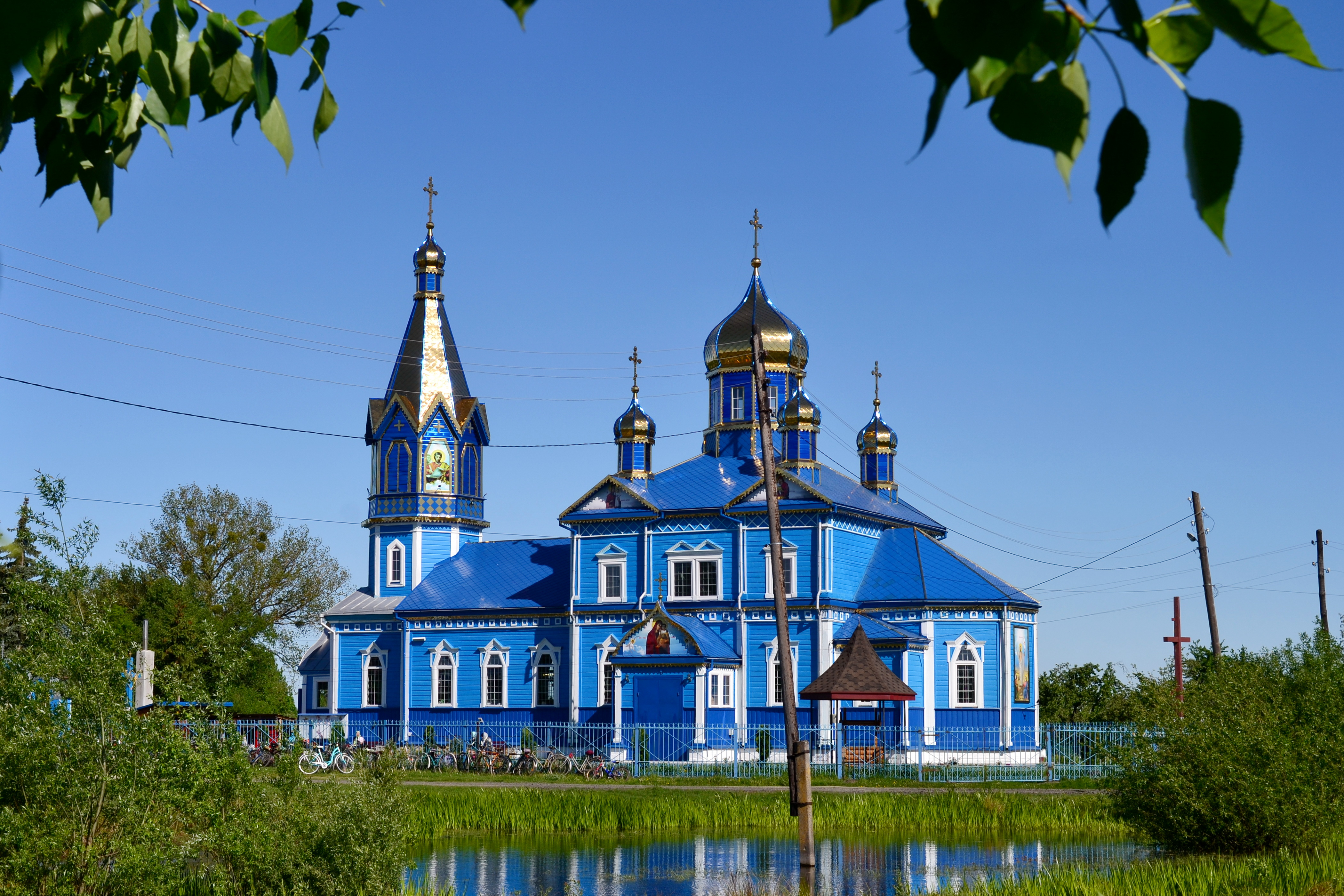 Покровська церква (дер.) (1900 рік) - вигляд з півдня - Дубечне (вул. Садова, 6Б) Старовижівський район Волинська область Україна